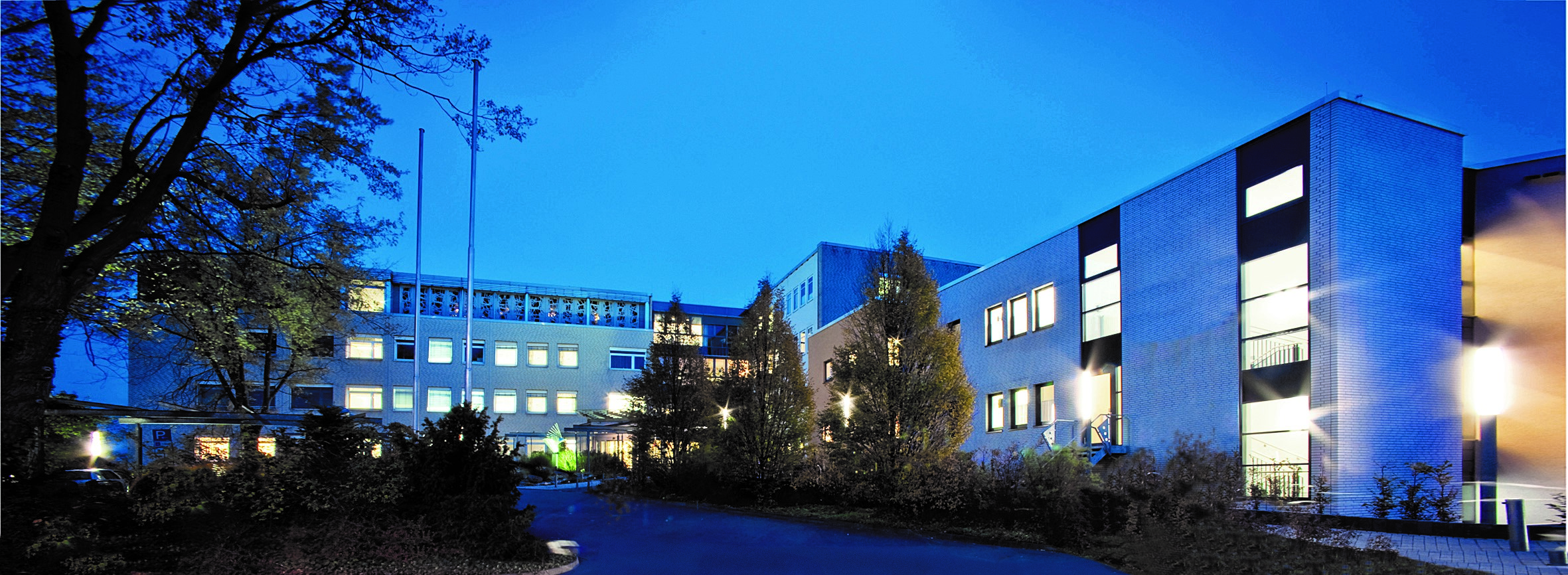 St. Vincenz-Krankenhaus Paderborn - Einfahrt